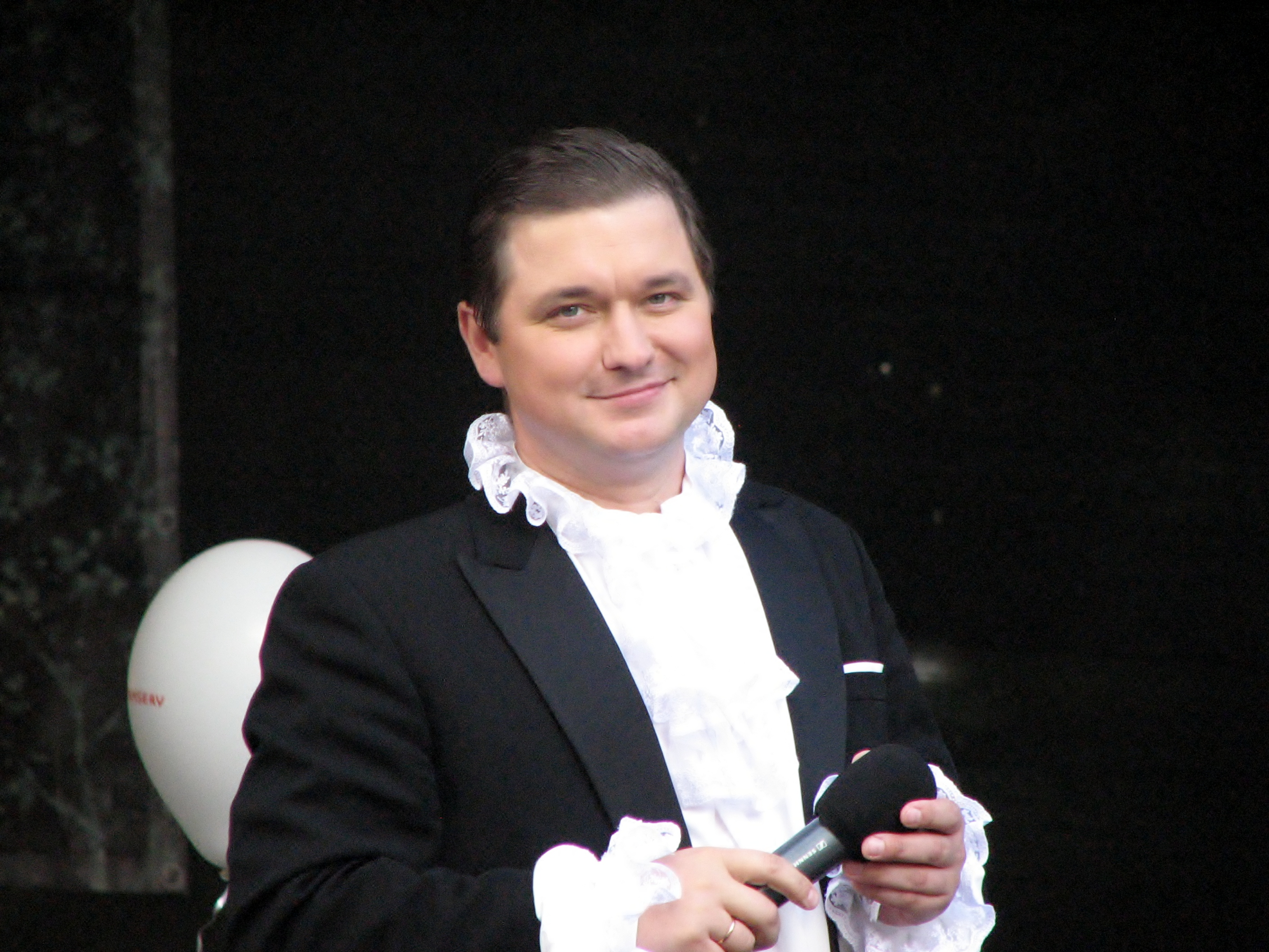 Urmas Põldma Estonia teatri 107. hooaja avamisel